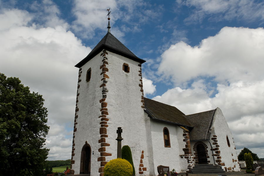 Alt St. Peter in Berndorf/Eifel